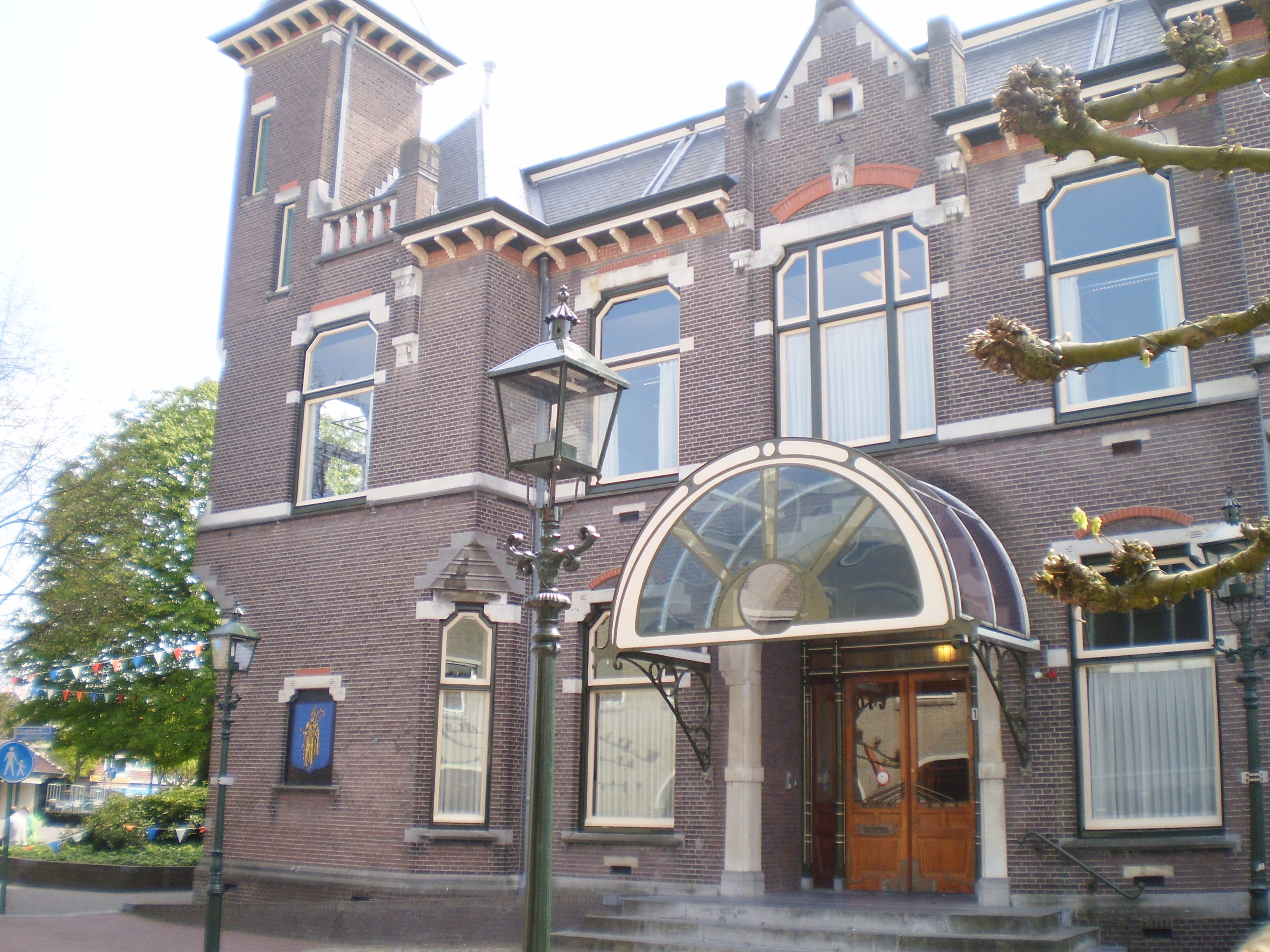 voorkant oude deel gemeentehuis aan de Laanstraat